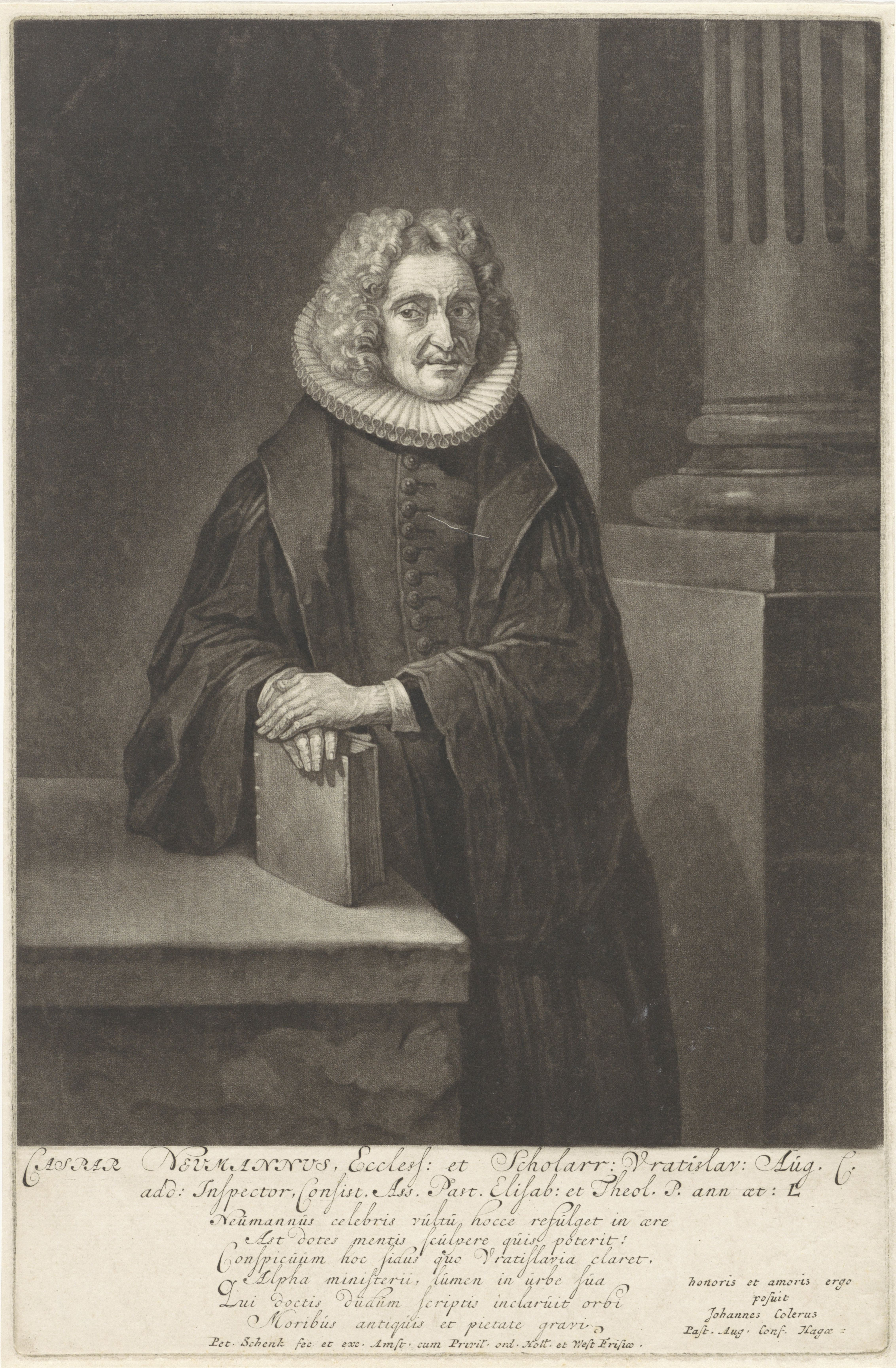 IdentificatieTitel(s): Portret van Kaspar NeumannObjecttype: prent Objectnummer: RP-P-1906-3530Catalogusreferentie: Hollstein Dutch 819-2(2)Opschriften / Merken: verzamelaarsmerk, verso, gestempeld: Lugt 2228Omschrijving: De theoloog en dichter Kaspar Neumann staat naast een zuil. Hij steunt met zijn handen op een boek.VervaardigingVervaardiger: prentmaker: Pieter Schenk (I) (vermeld op object)schrijver: Johann Coler (vermeld op object)uitgever: Pieter Schenk (I) (vermeld op object)verlener van privilege: Staten van Holland en West-Friesland (vermeld op object)Plaats vervaardiging: AmsterdamDatering: 1670 - 1713Fysieke kenmerken: mezzotint en gravureMateriaal: papier Techniek: mezzotint / graveren (drukprocedé)Afmetingen: plaatrand: h 308 mm × b 199 mmOnderwerpWat: theologianbookWie: Caspar NeumannVerwerving en rechtenVerwerving: aankoop 1906Copyright: Publiek domein